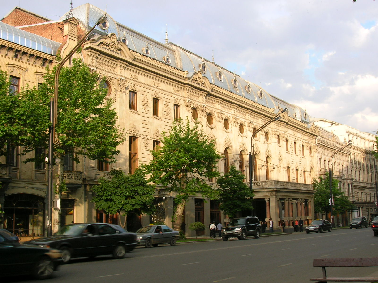 Rustaweli Boulevard, Staatliches Akademisches Theater Schota Rustaweli, Tiflis, Georgien